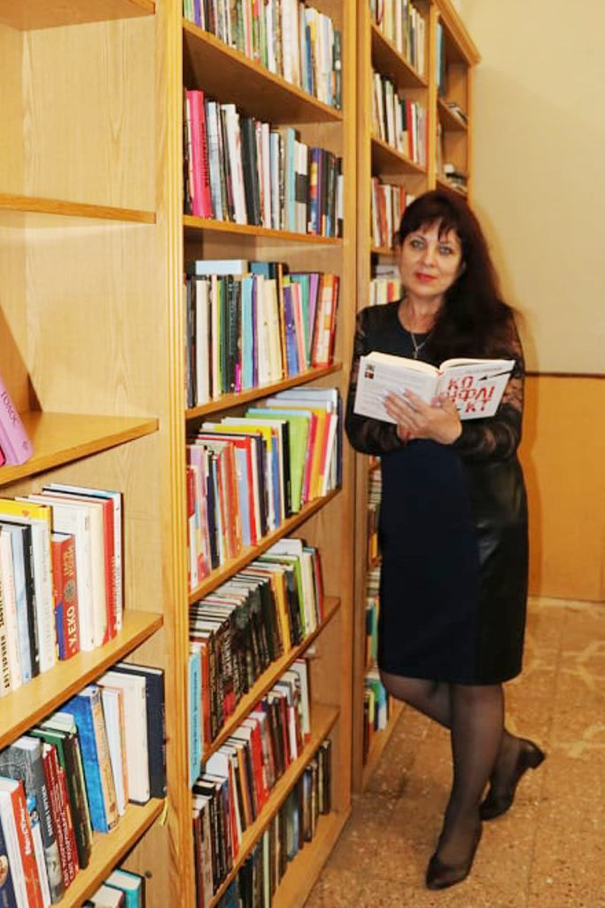 читання